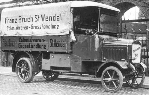 Lastkraftwagen Mannesmann-Mulag, Baujahr 1913, 42 PS, 3,5 t zGGFahrzeug der Kolonialwaren-Großhandlung Franz Bruch in St. Wendel (Vorgängerin der Globus SB-Warenhaus Holding GmbH & Co. KG)